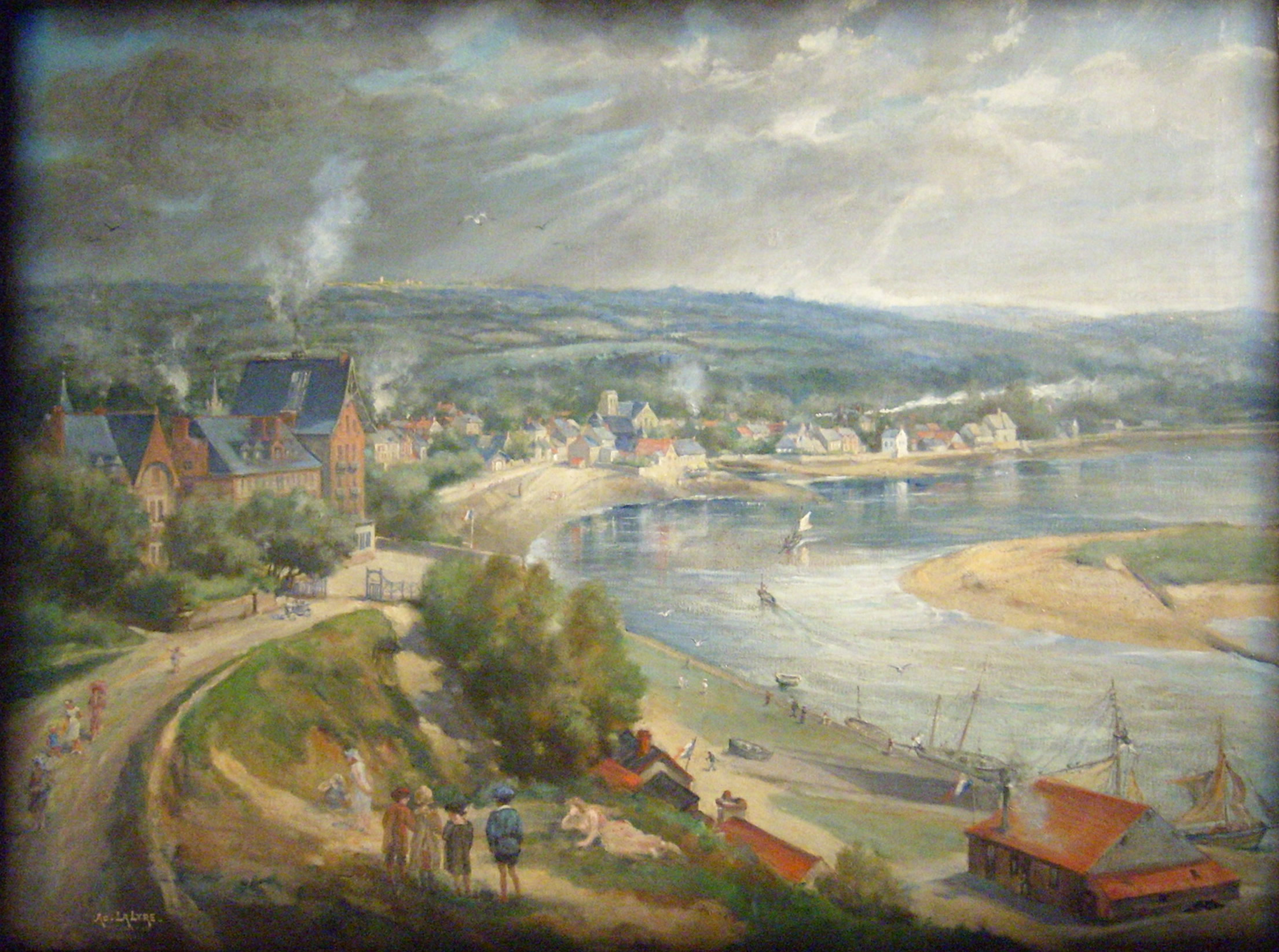 Carteret vu du Château des Sirènes, Adolphe Lalye. Exposition au Musée Thomas-Henry, Cherbourg-Octeville, prêt de la mairie de Barneville-Carteret